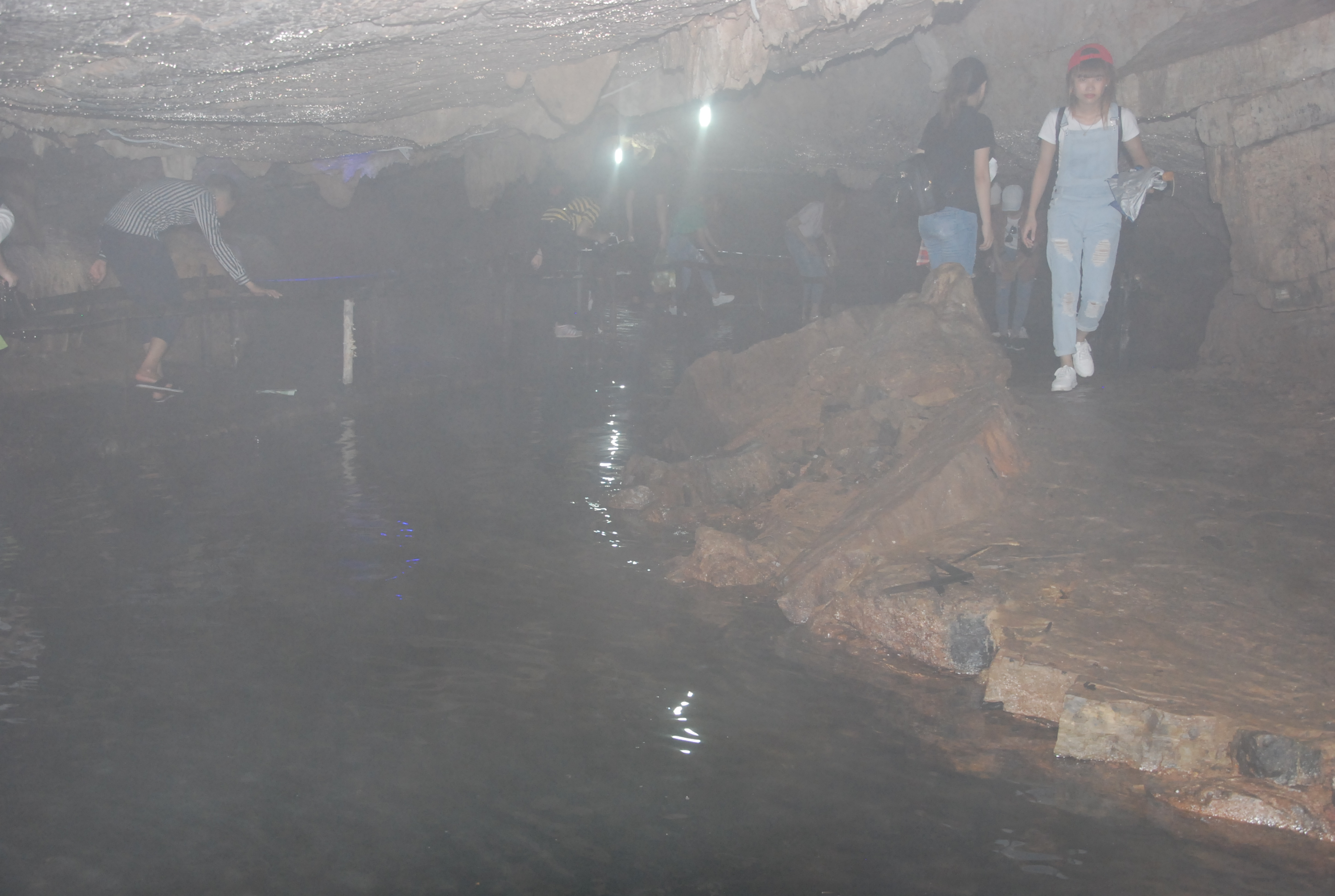 Động Tiên Cá thuộc Thung Nham trong Quần thể di sản thế giới Tràng An